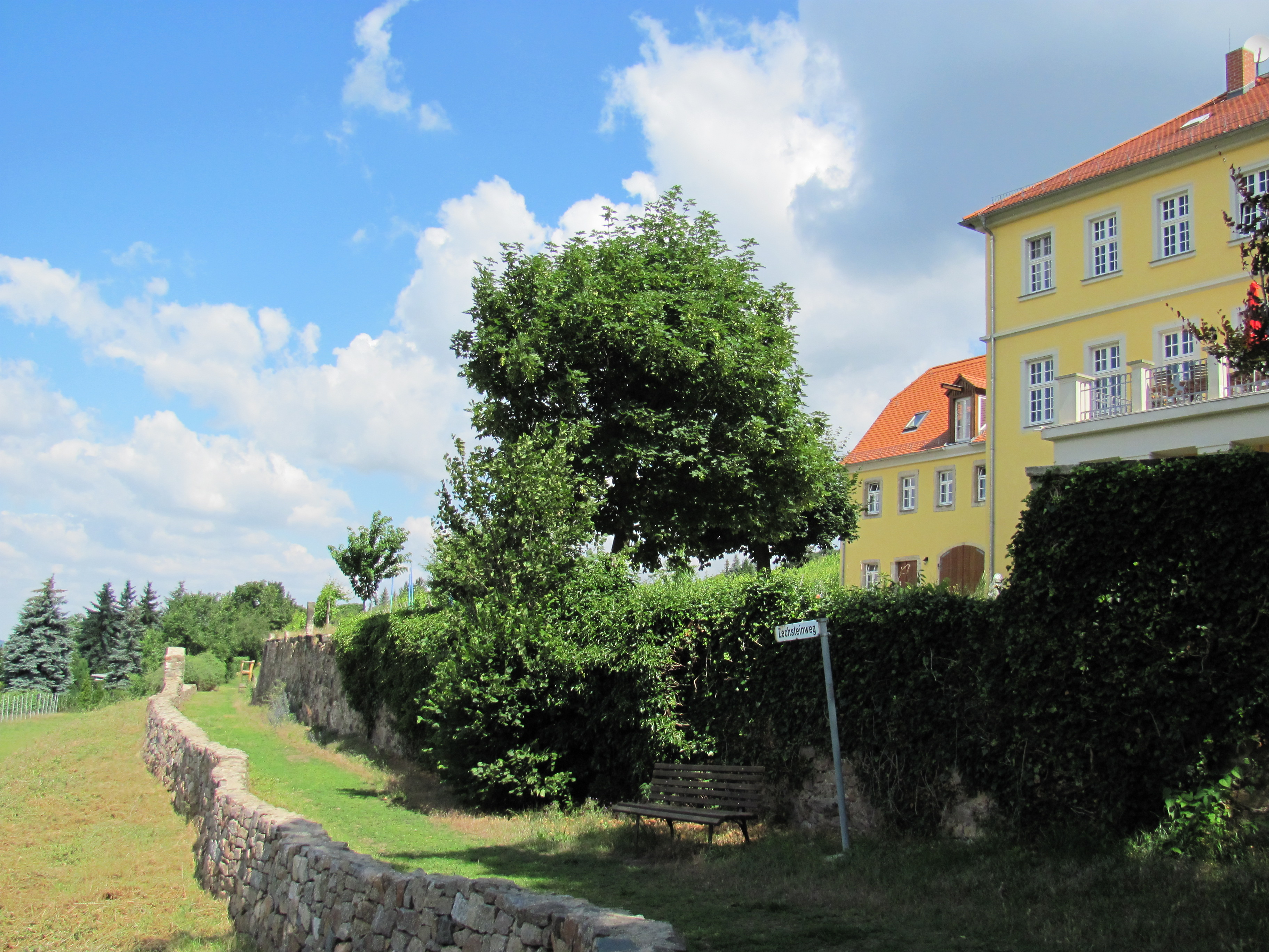 Radebeul, Zechsteinweg unterhalb von Herrenhaus Zechstein (Lößnitz)